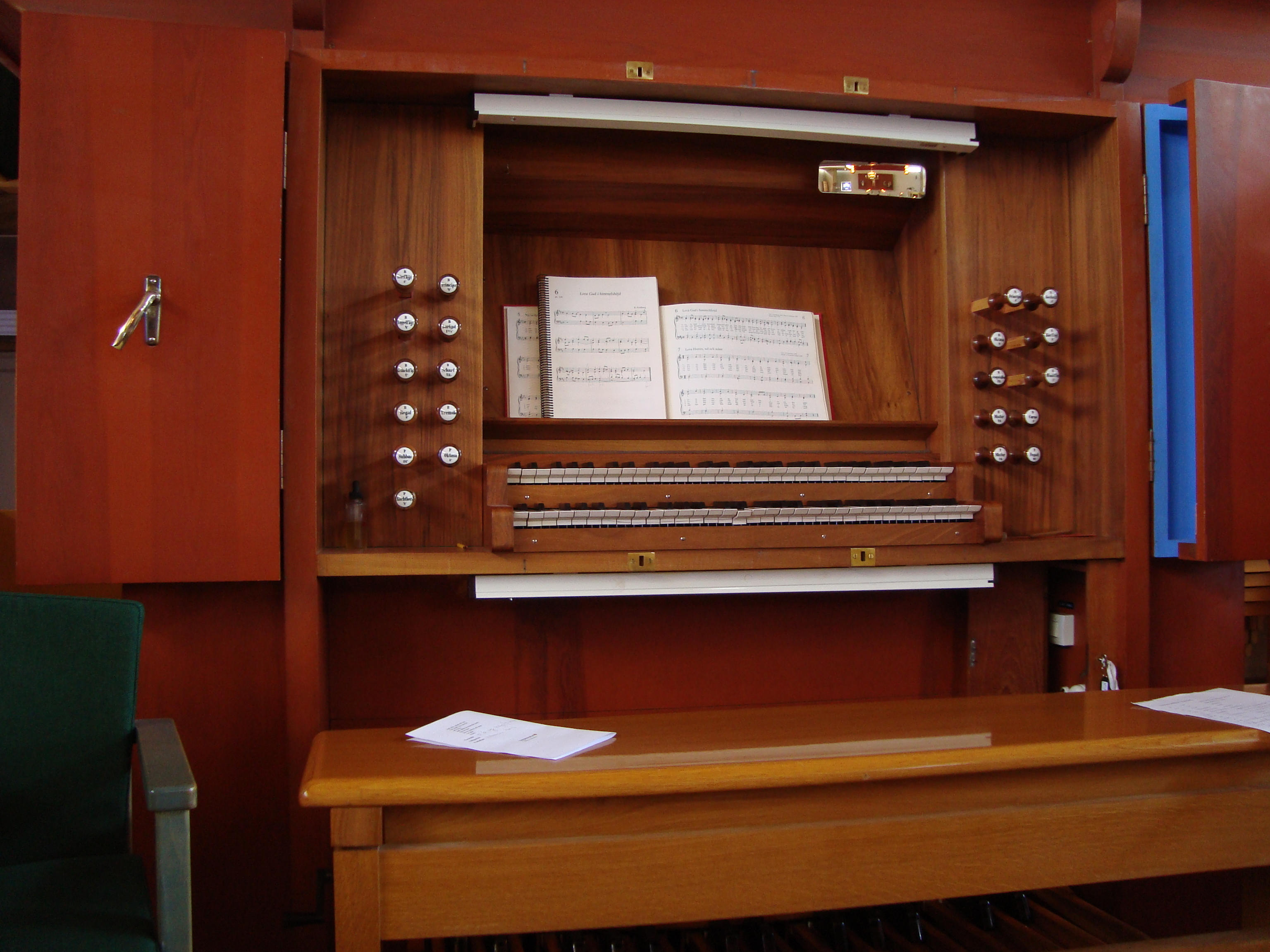 Aspeboda kyrka, Falu kommun, Sverige